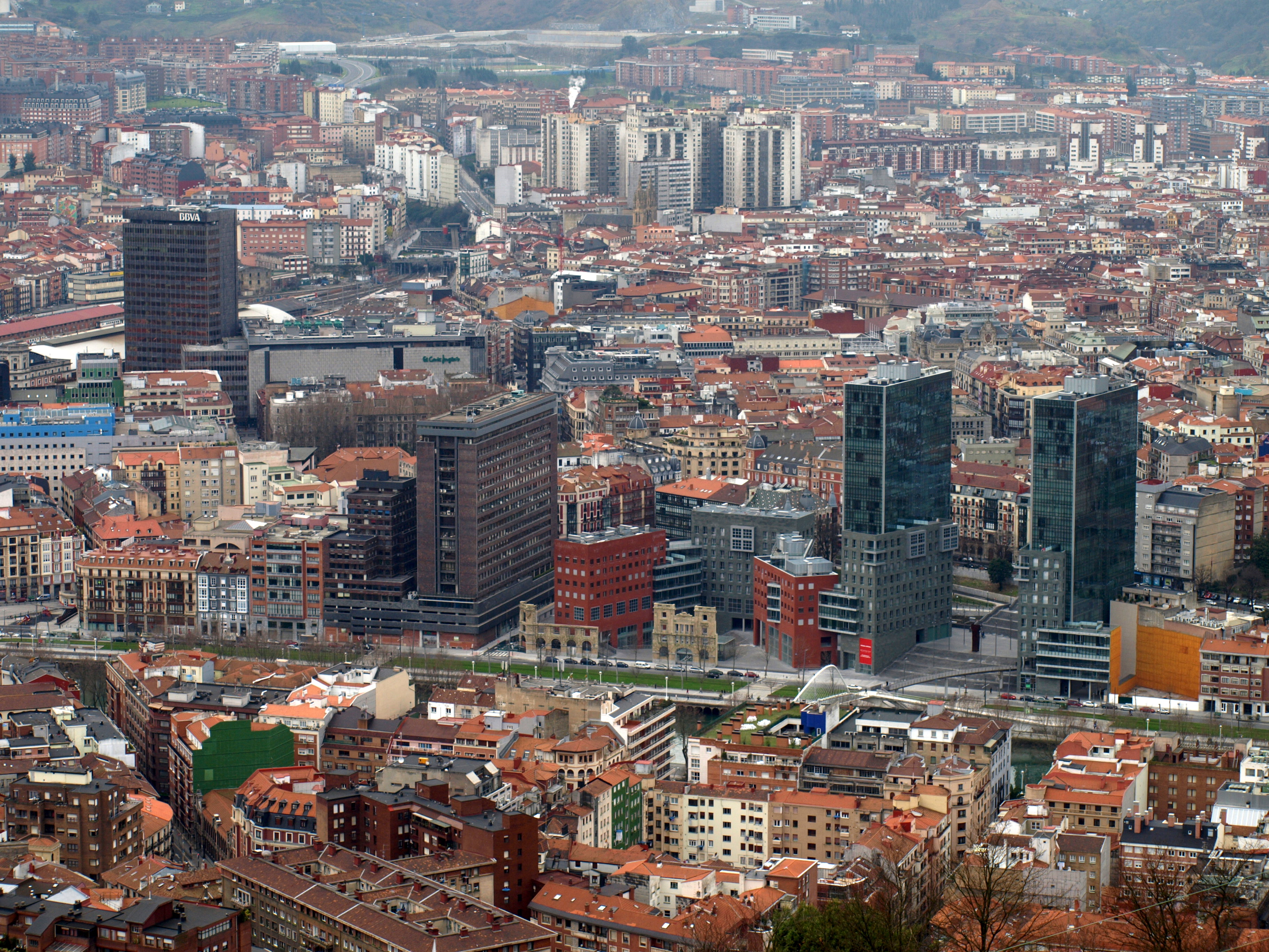 Vista de Castaños (a este lado del río) y Abando (al otro) desde el mirador de Artxanda.